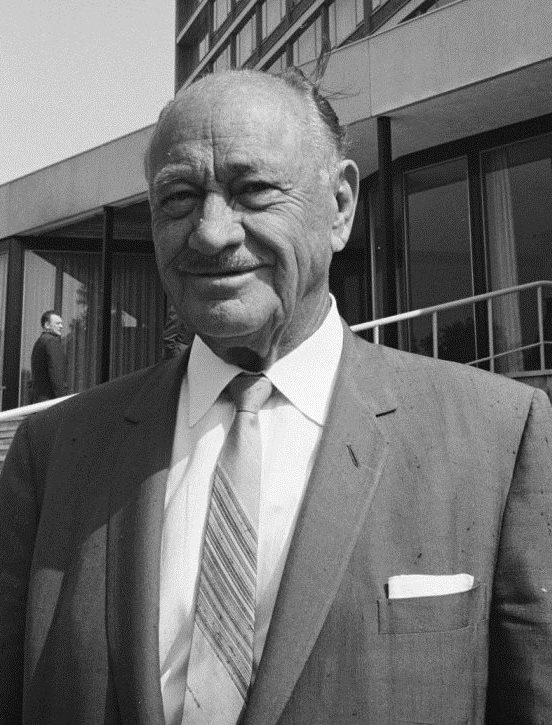 Conrad N. Hilton voor zijn nieuwe hotel in Amsterdam (portret).